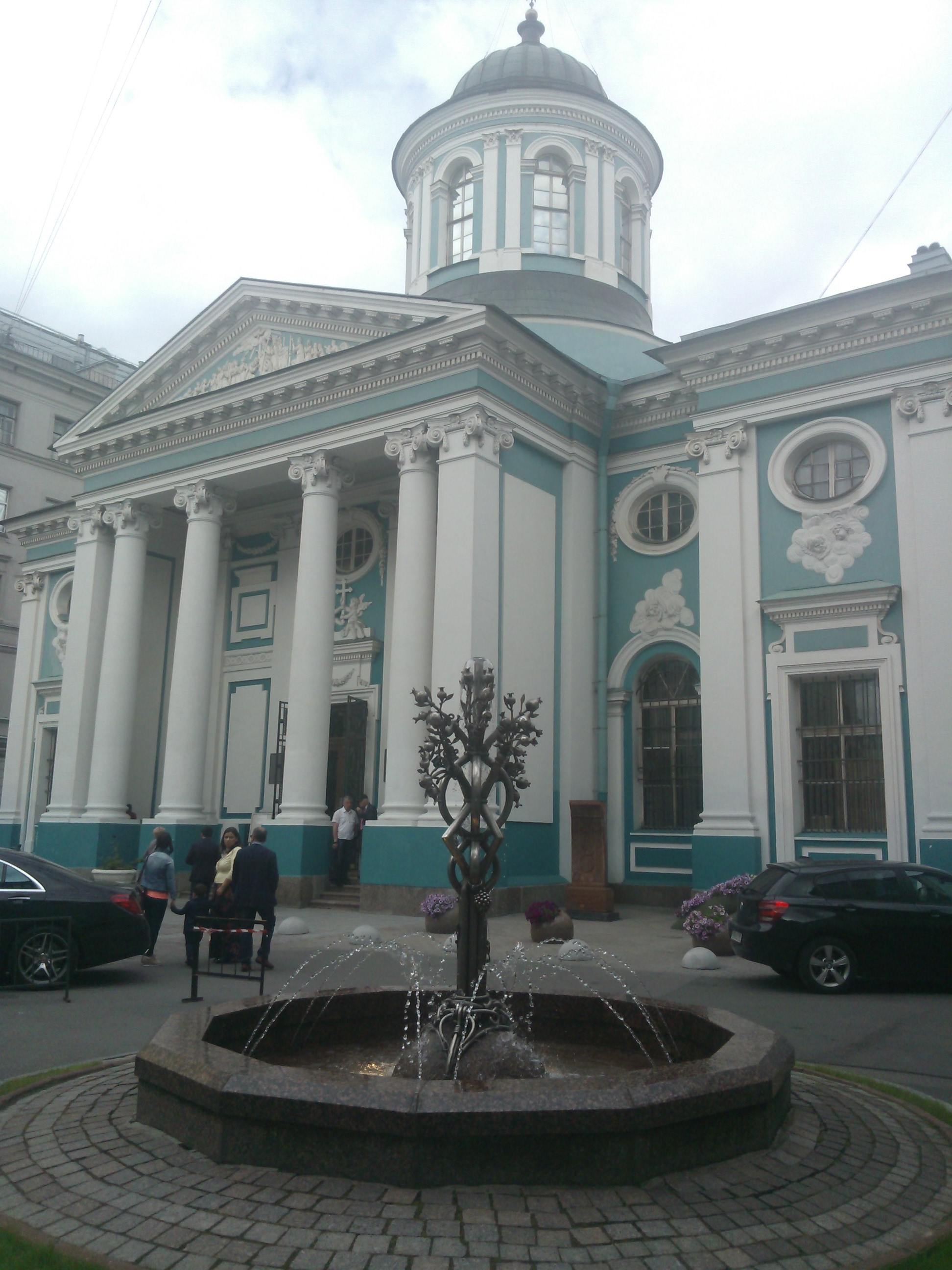 Սուրբ Կատարինե եկեղեցի (Սանկտ Պետերբուրգ)